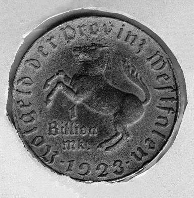 Notgeld der Provionz Westfalen 1923: 1 Billion Mark